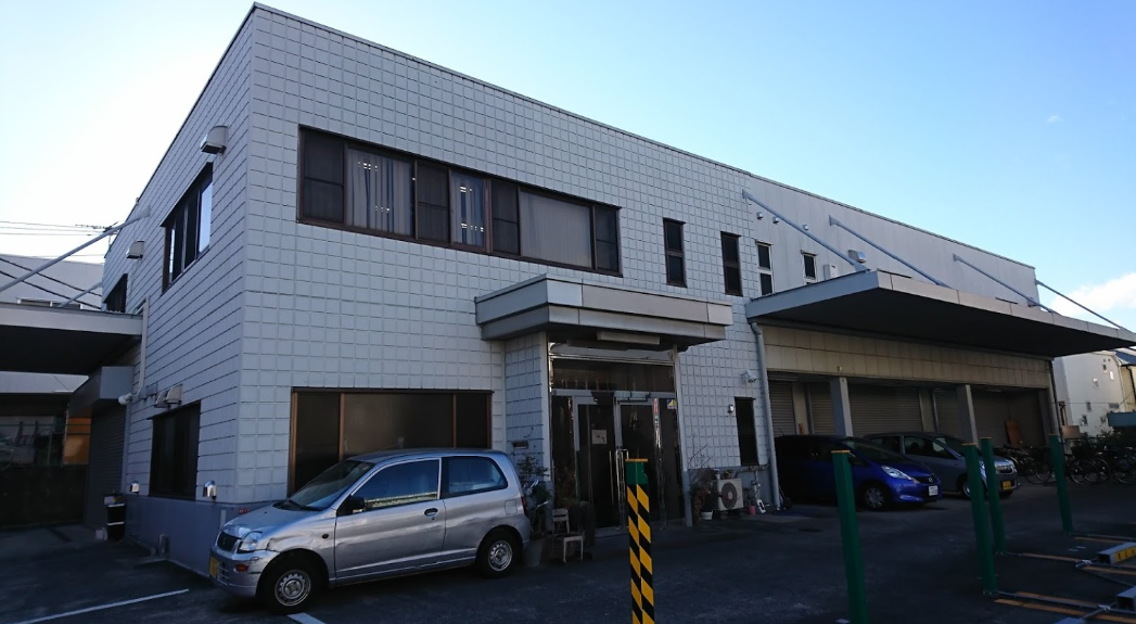 杉並区本天沼 第2榎本ビル ufotable東京スタジオ